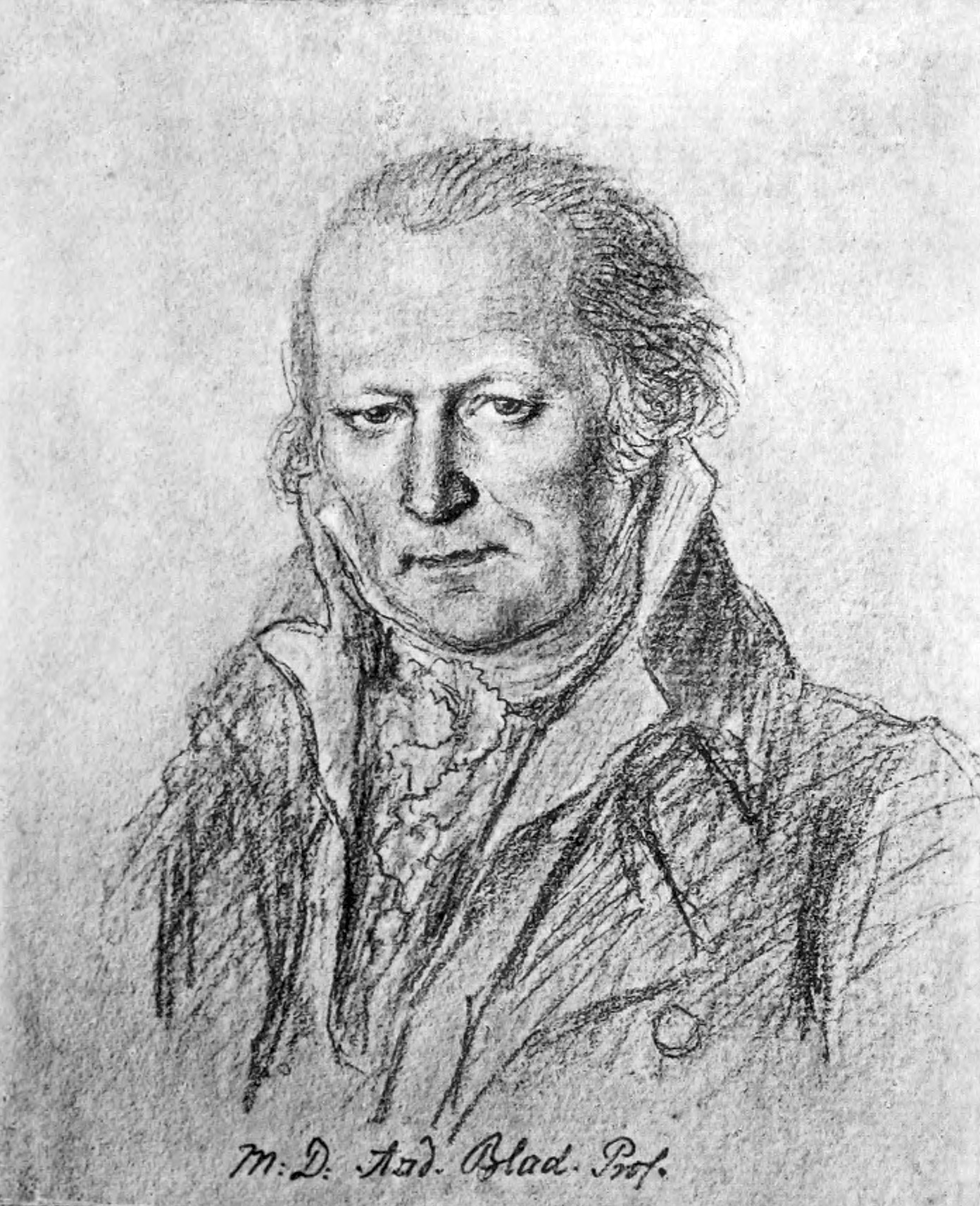 Anders Blad (1748-1834)